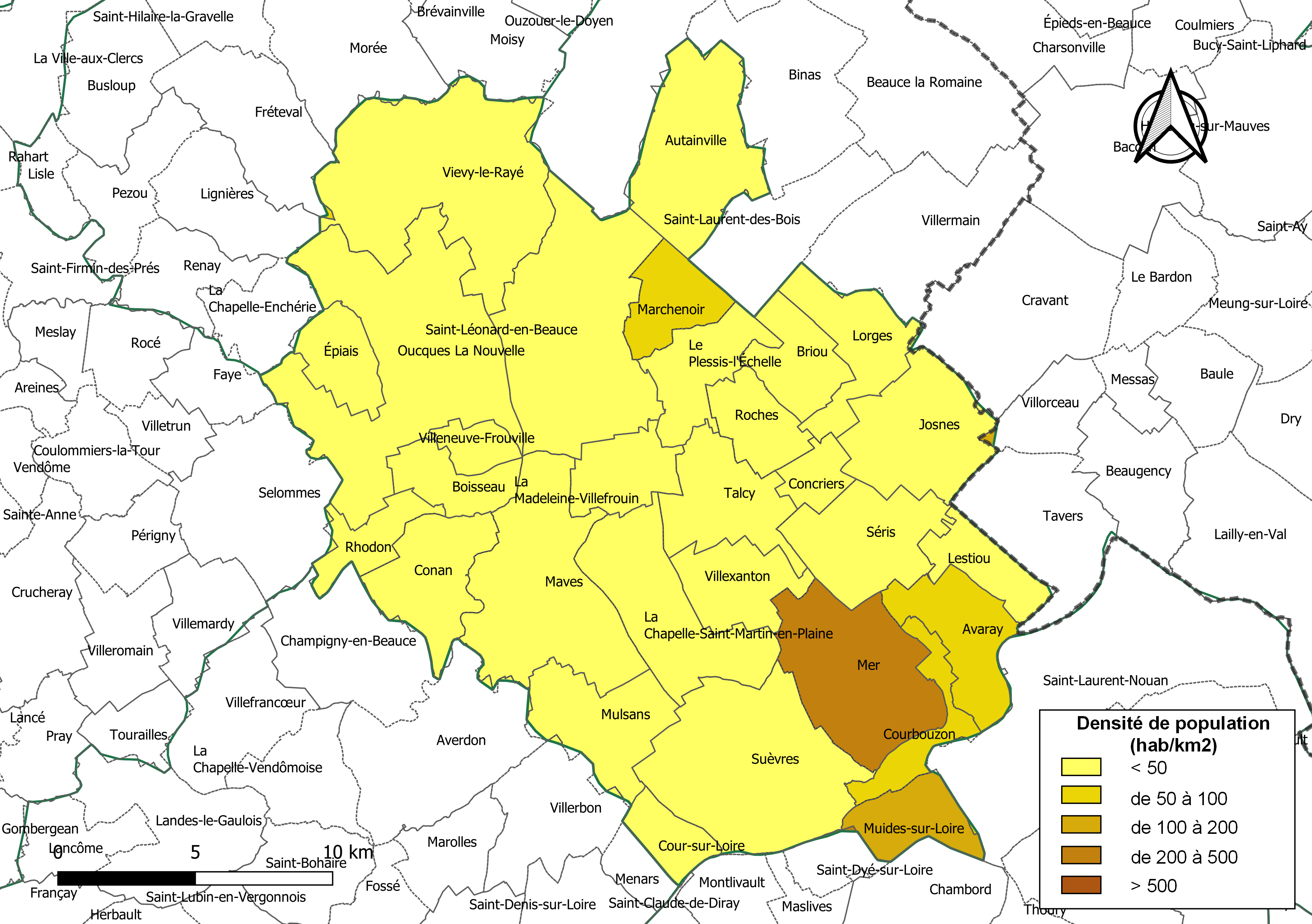 Carte des densités de population (millésimée 2016) des communes de la communauté de communes la Communauté de communes Beauce Val de Loire, département de Loir-et-Cher, France. Composition au 1er janvier 2019.